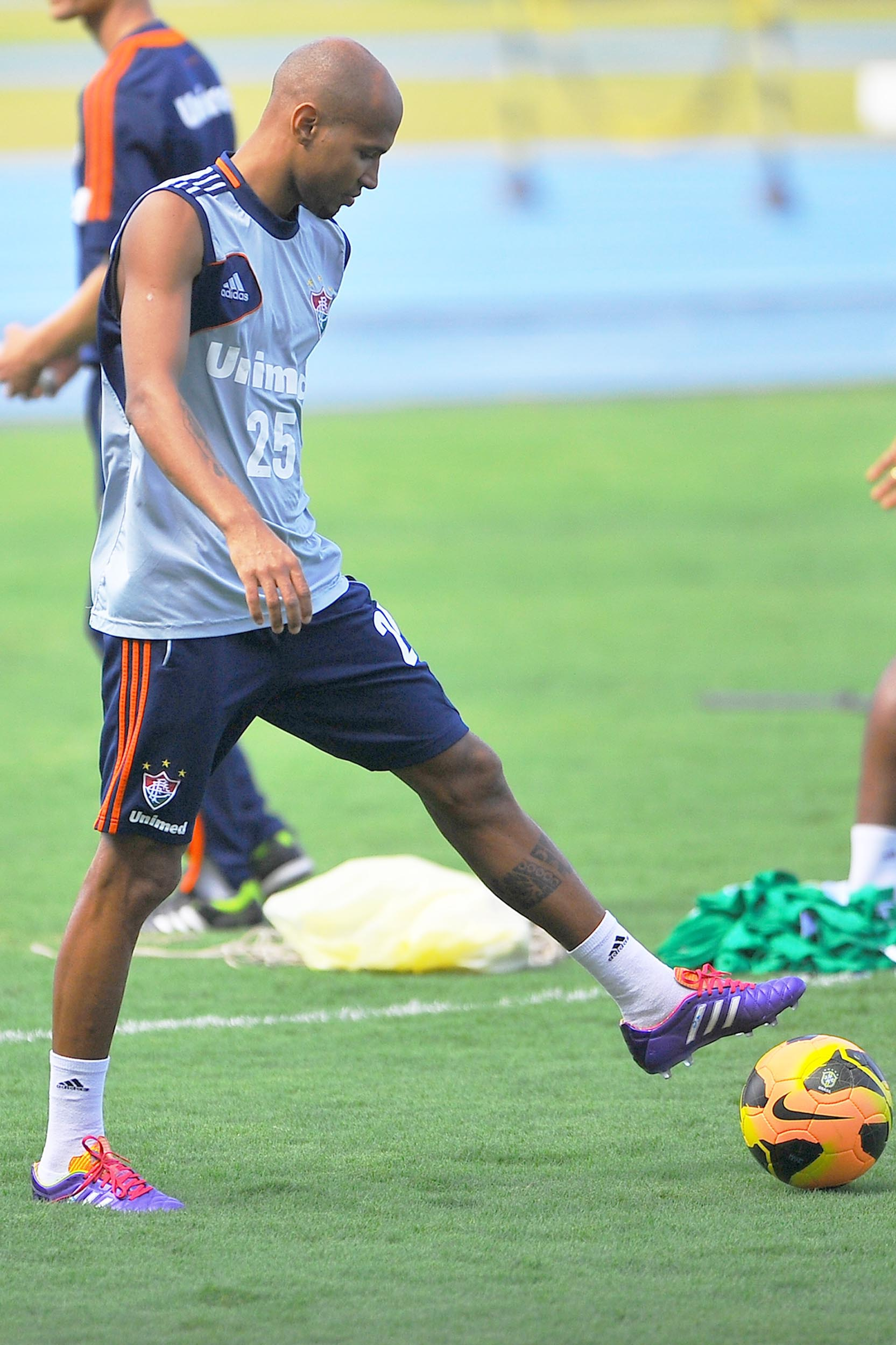 Rio de Janeiro, Rio de Janeiro, Brasil, 13 NOVEMBRO 2013- WELLINGTON SILVA. Durante o treino realizado nas EsEFex (URCA) Foto: Moysés Ferman